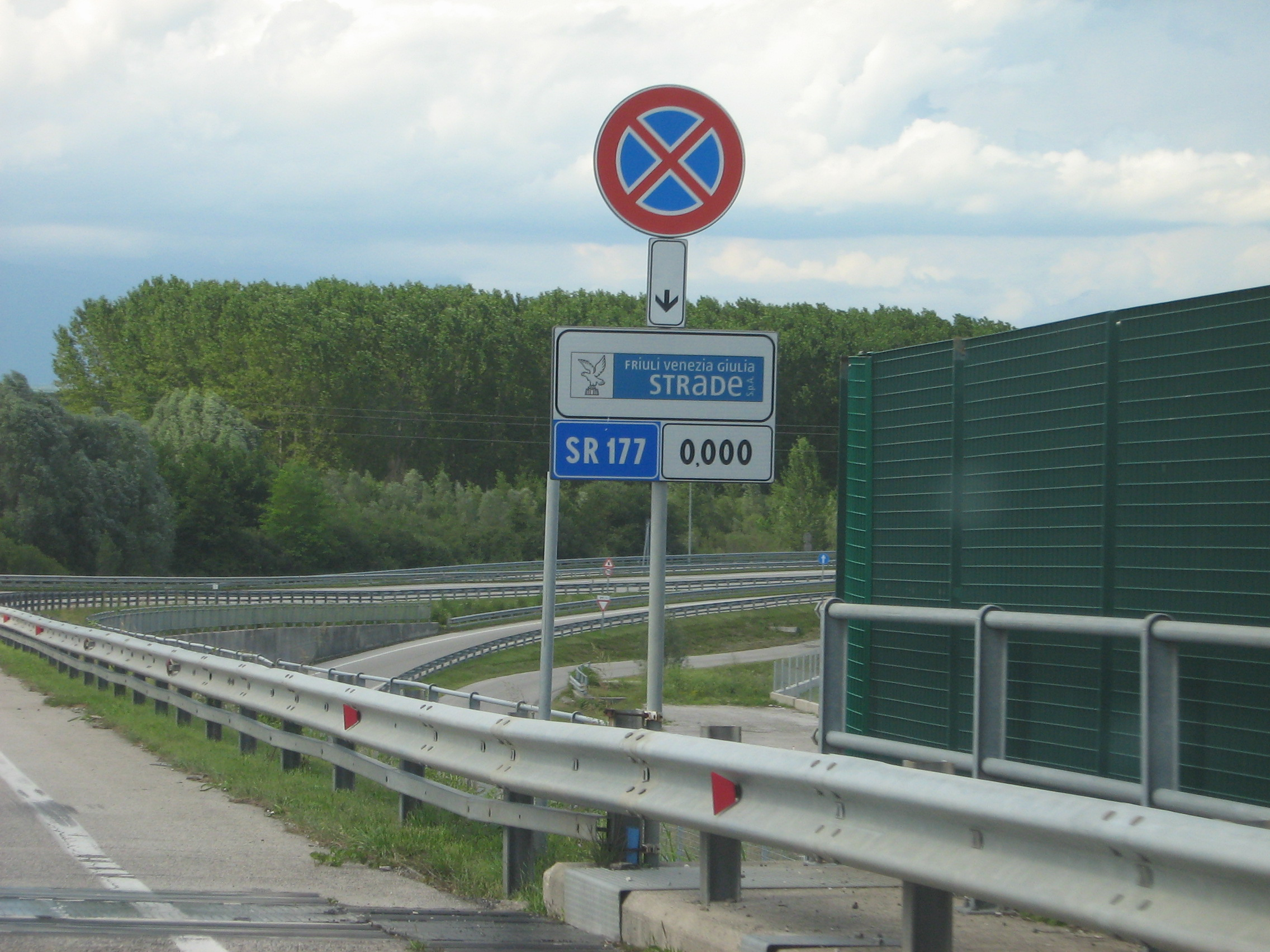 Strada regionale 177 Friuli Venezia Giulia provenendo dal RA16